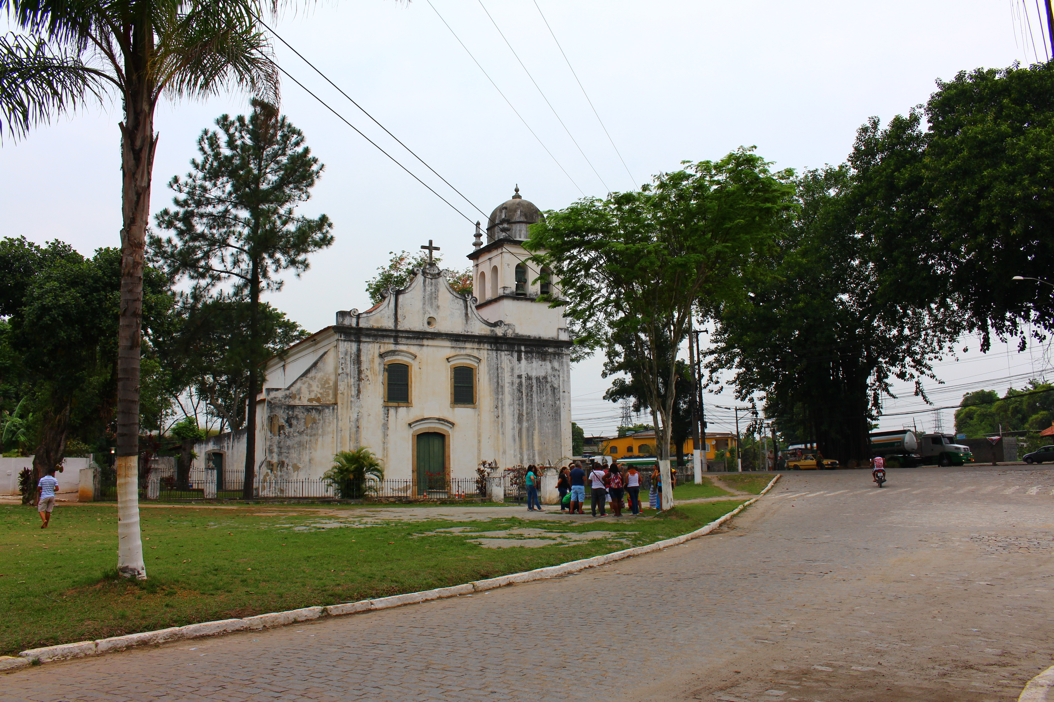 Igreja Matriz de Nossa Senhora do Pilar